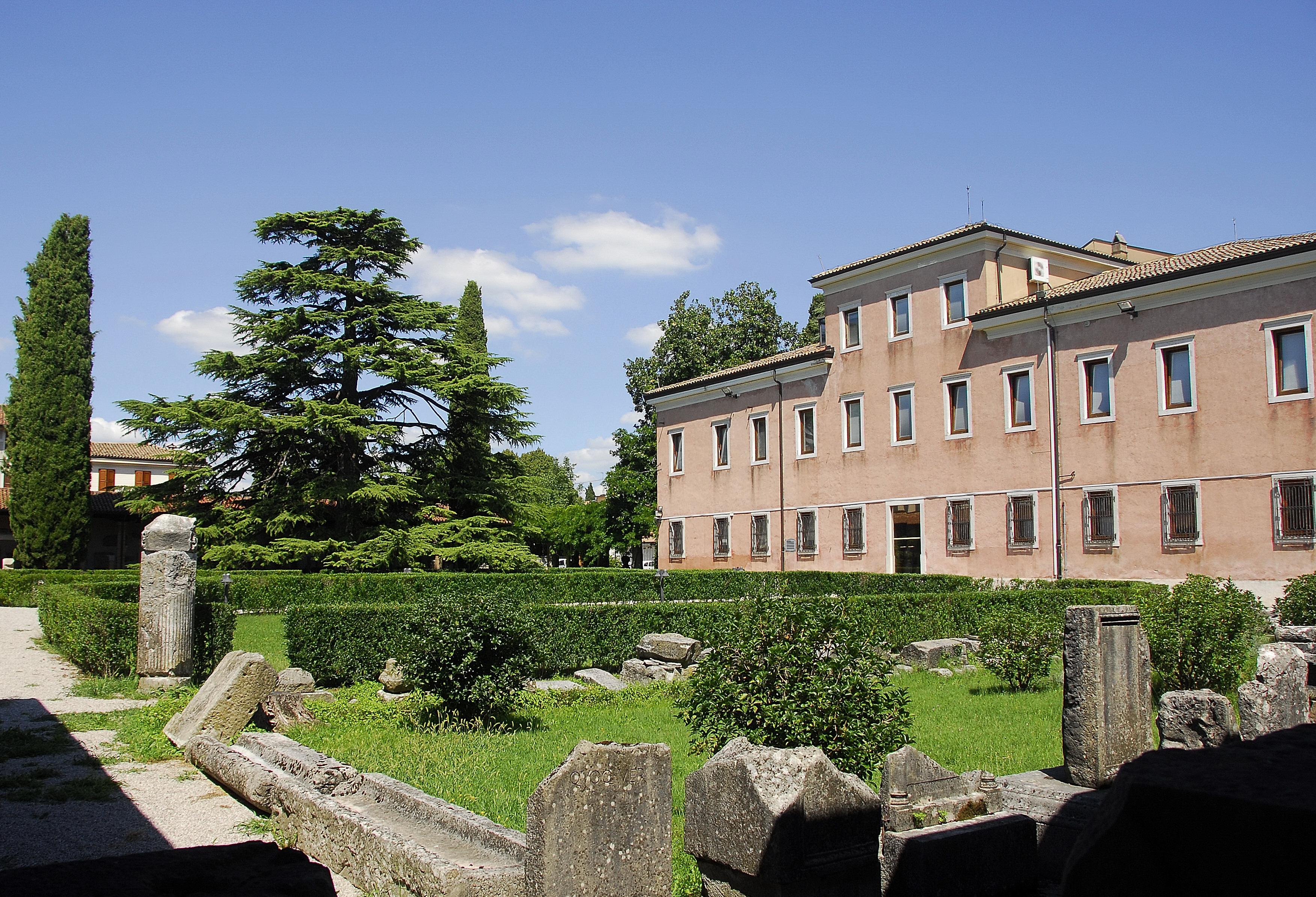 Museo archeologico nazionale di Aquileia - Italia.